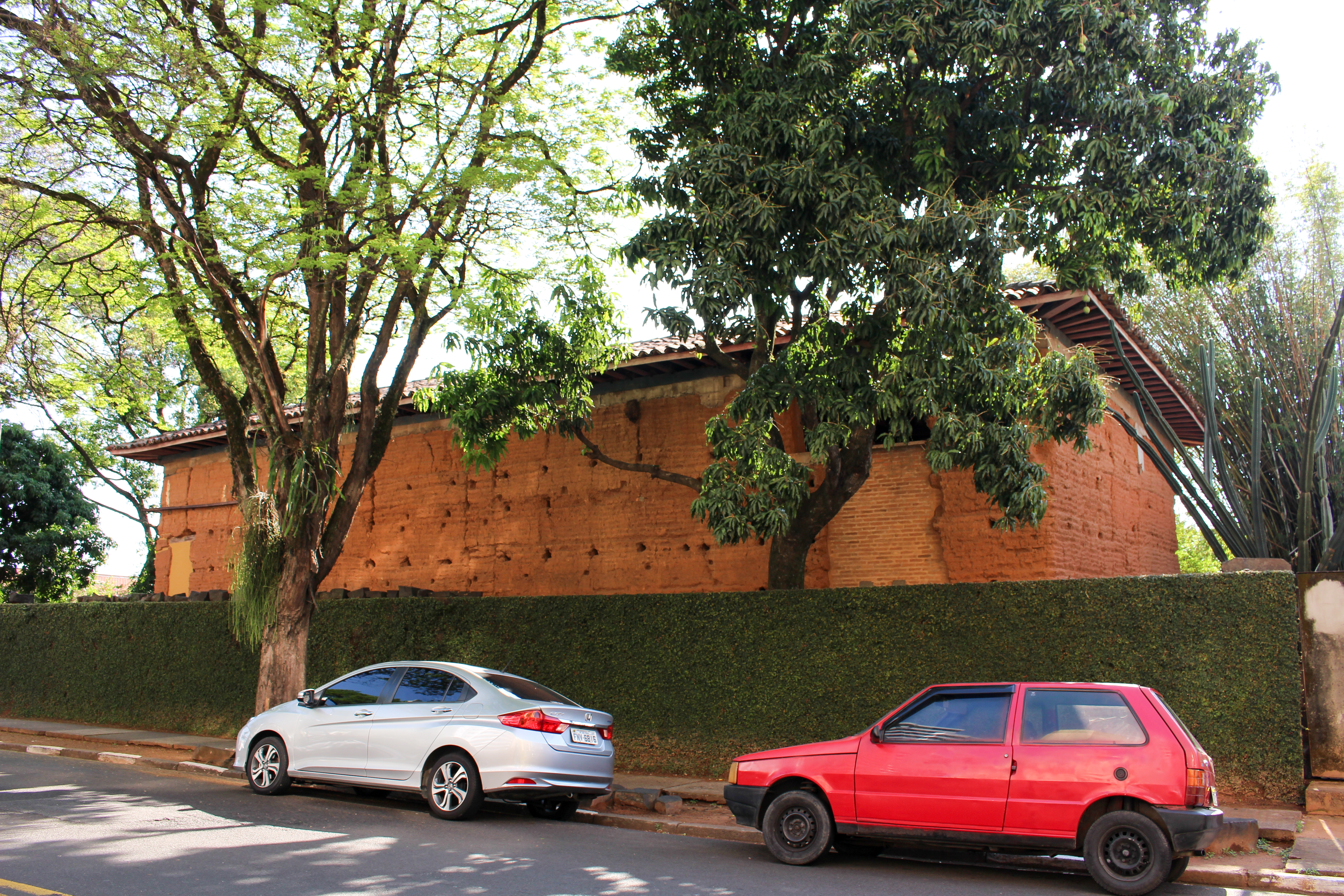 Casa Grande e Tulha da Antiga Chácara do Paraíso das Campinas Velhas, situada na Avenida Arlindo Joaquim de Lemos, 1300